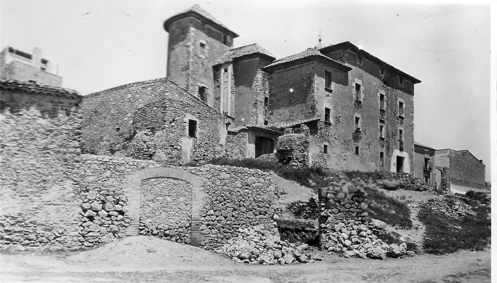 Castell de Cubelles. Fotografia de principis del segle XX. Arxiu Antoni Pineda